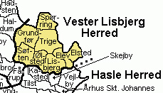 Århus Amt, Denmark Source: Map by Svend-Erik Christiansen